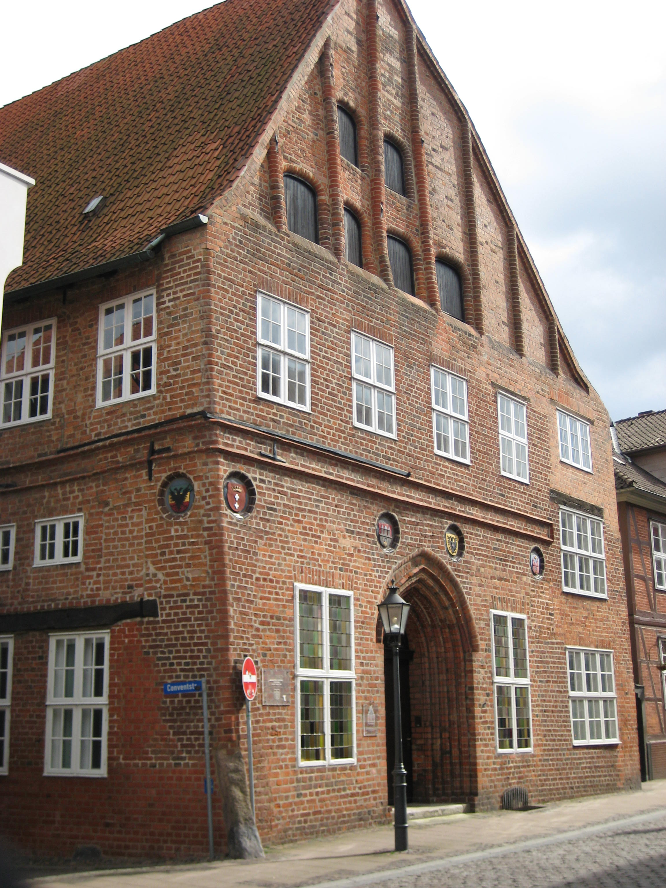 Haus der Familie Brömse in Lüneburg mit Jahresangabe 1406